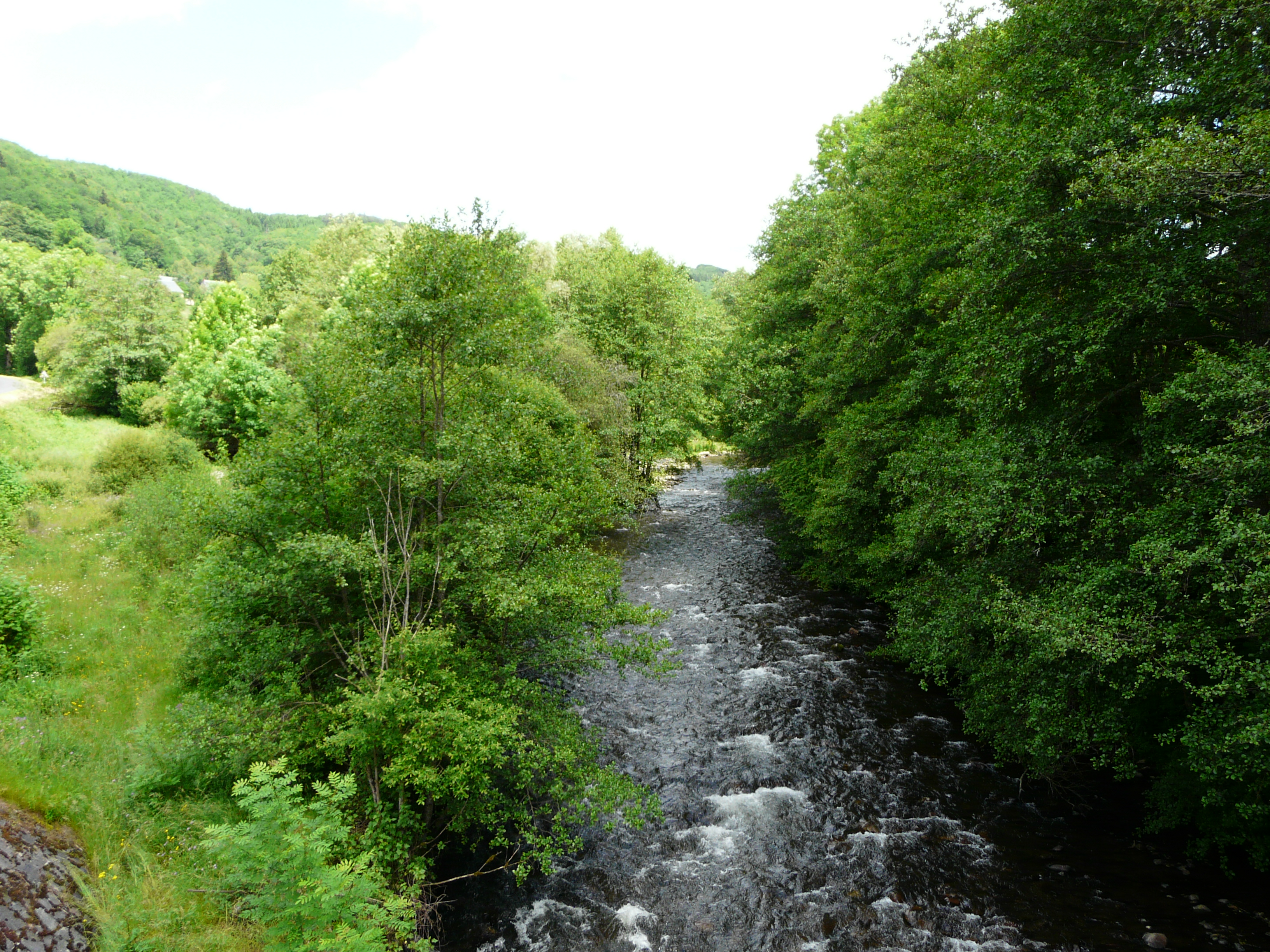 La Dordogne, dans la partie la plus large des gorges d'Avèze, en amont du pont de la route départementale 73, entre Messeix (à gauche) et Avèze (à droite), Puy-de-Dôme, France.